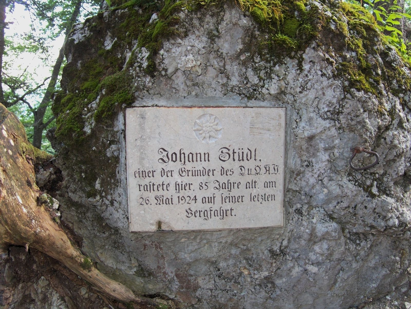 Gedenktafel für Johann Stüdl im Tennengebirge